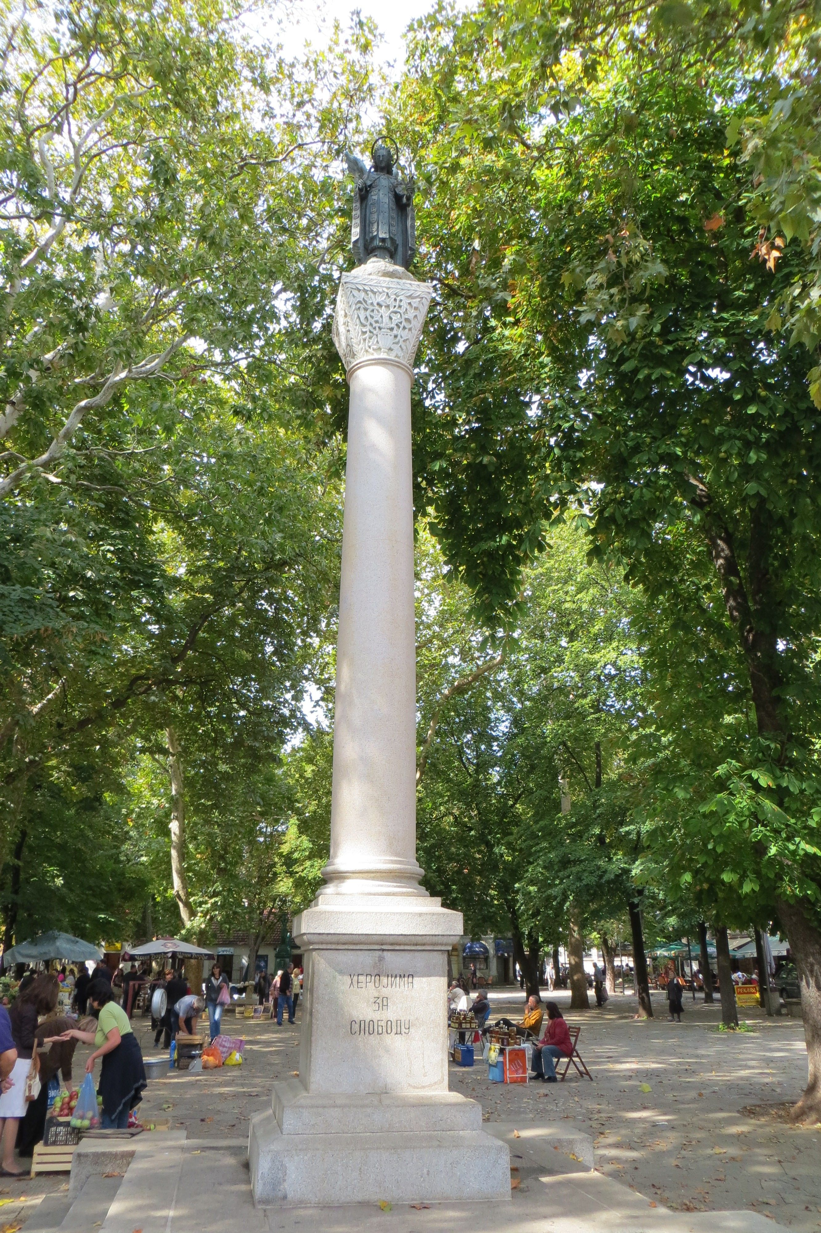 Trebinje, Bosnia and Herzegovina